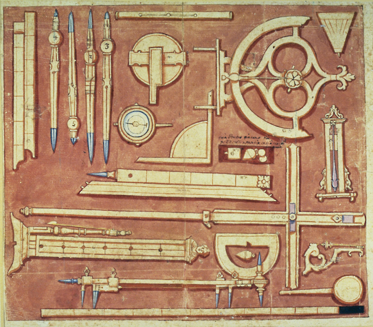 Author Christoph Schissler (1531–1608) Date of birth/deathcirca 15311608Authority control : Q18508086 VIAF: 79428977 LCCN: nr2006020586 WorldCat TitleDissigno della parte superiore, come ciaschun instrumento, sendo cavato fuora, ha d'essere riposto nel debito luogoDescription disegno della cassetta di strumenti matematici di Christoph Schissler Datefra 1601 e 1650Dimensions39 x 40 cmCurrent location (Inventory)Museo Galileo Native nameMuseo GalileoLocationFlorenceCoordinates43° 46′ 04″ N, 11° 15′ 21″ E Established1930Website control : Q1668196 VIAF: 139974525 ISNI: 0000 0000 9503 3657 LCCN: no2010157919 WorldCat BibliotecaSource/PhotographerMuseo GalileoPermission (Reusing this file) This work is in the public domain in its country of origin and other countries and areas where the copyright term is the author's life plus 70 years or less. You must also include a United States public domain tag to indicate why this work is in the public domain in the United States. Note that a few countries have copyright terms longer than 70 years: Mexico has 100 years, Jamaica has 95 years, Colombia has 80 years, and Guatemala and Samoa have 75 years. This image may not be in the public domain in these countries, which moreover do not implement the rule of the shorter term. Côte d'Ivoire has a general copyright term of 99 years and Honduras has 75 years, but they do implement the rule of the shorter term. Copyright may extend on works created by French who died for France in World War II (more information), Russians who served in the Eastern Front of World War II (known as the Great Patriotic War in Russia) and posthumously rehabilitated victims of Soviet repressions (more information). This file has been identified as being free of known restrictions under copyright law, including all related and neighboring rights. disegno della cassetta di strumenti matematici di Christoph Schissler